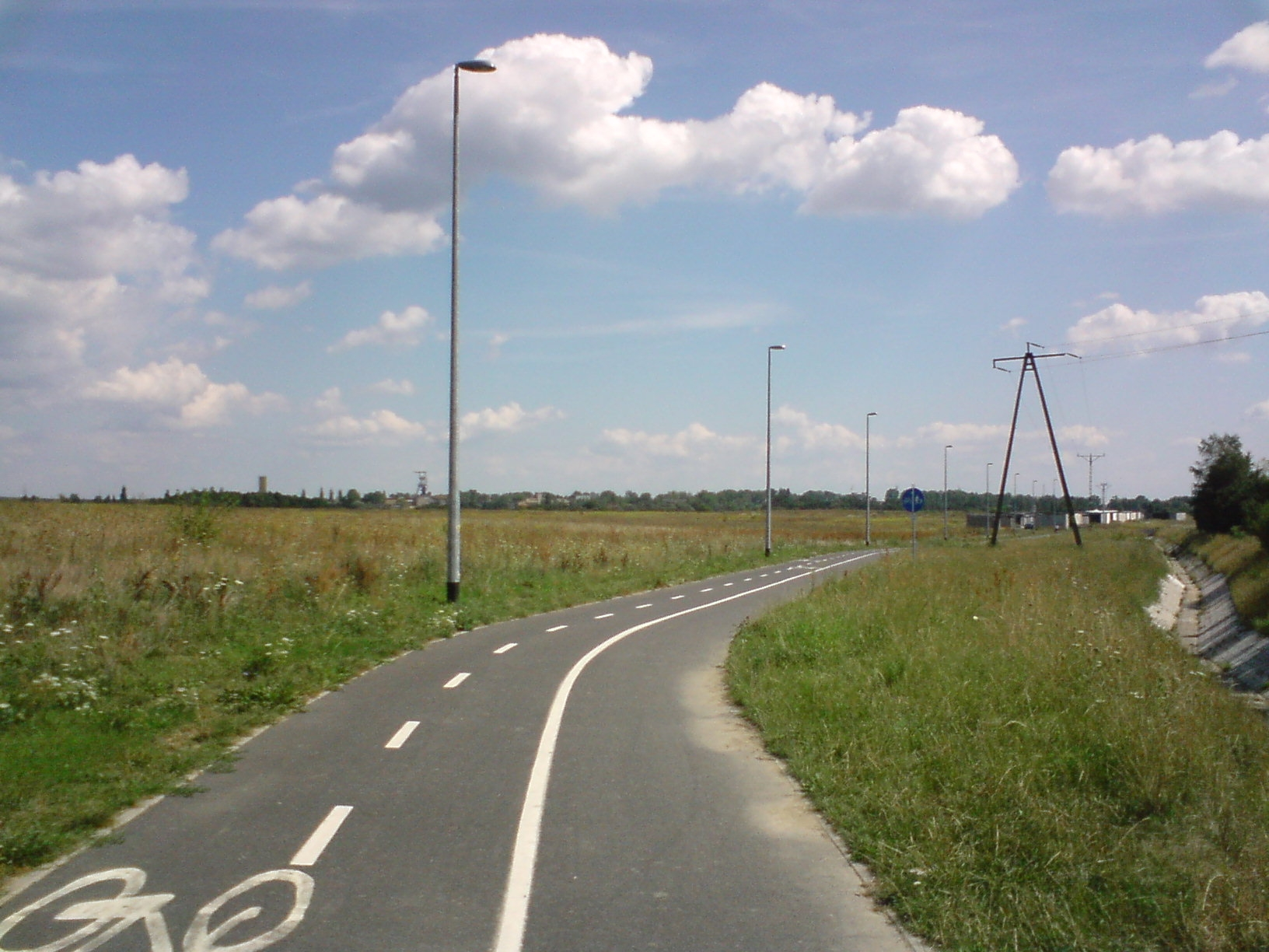 Droga rowerowa na krańcu Lubina